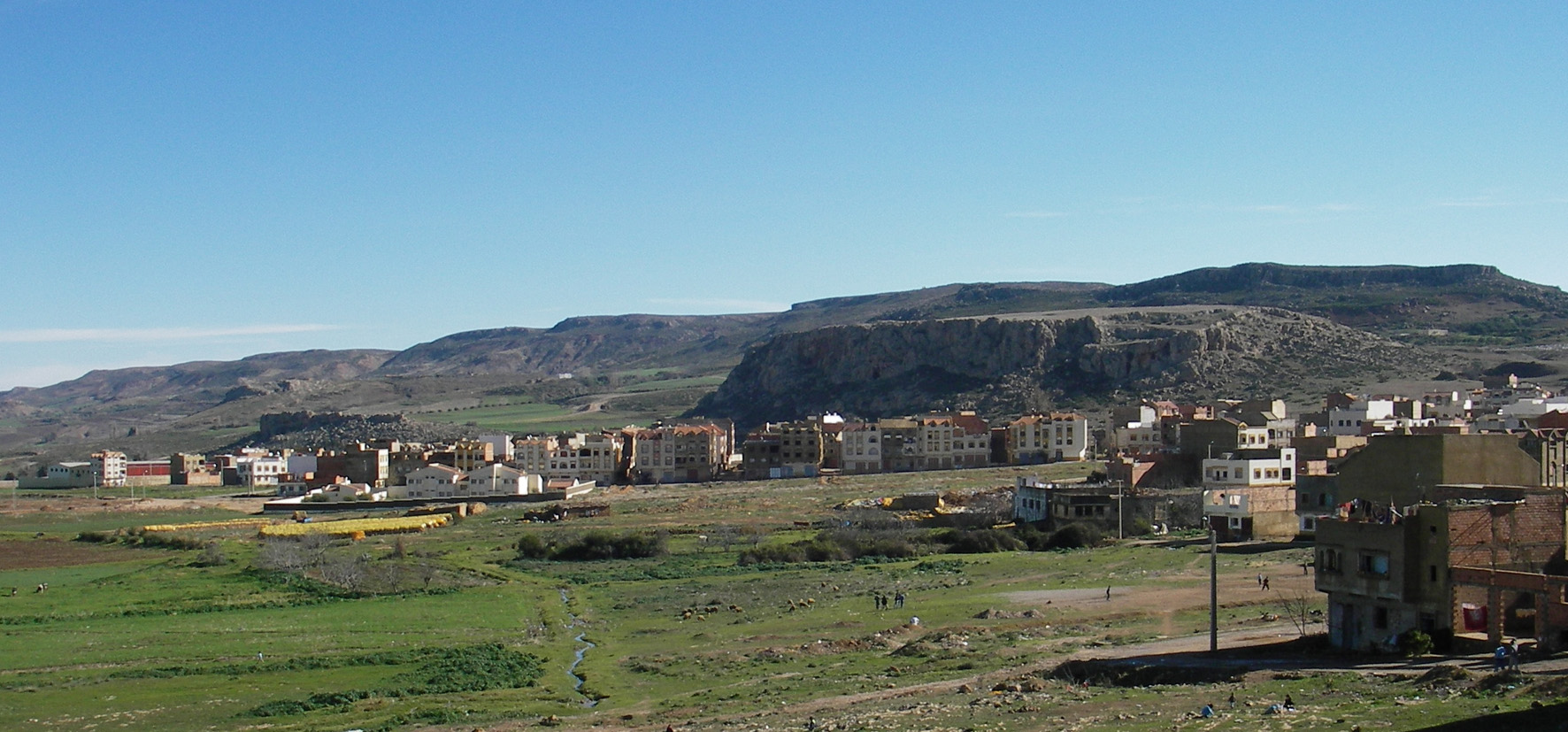 El Hajeb les Falaises vues depuis les quartiers est (Maroc).JPG